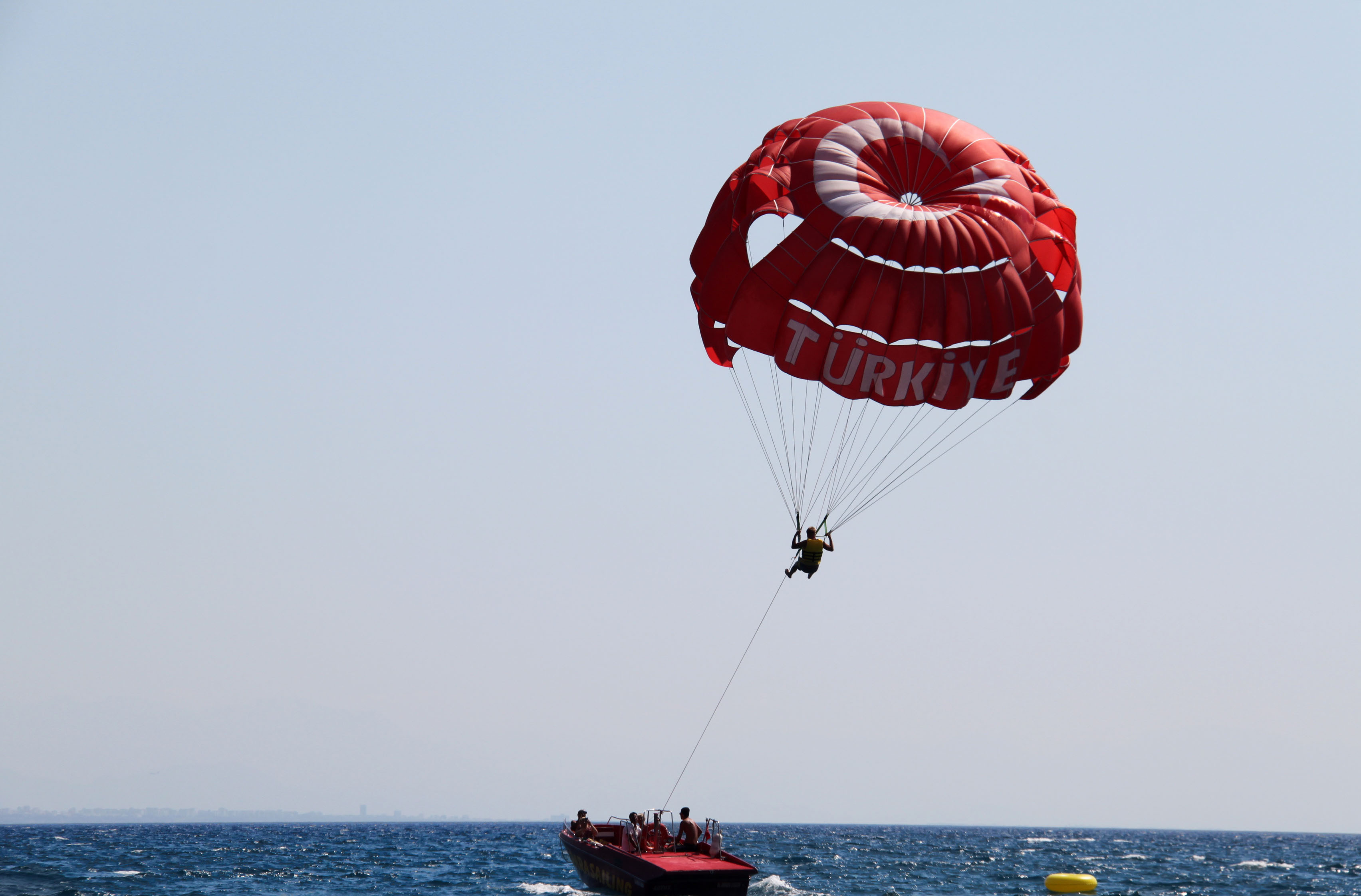 Парасейлинг в Бельдиби